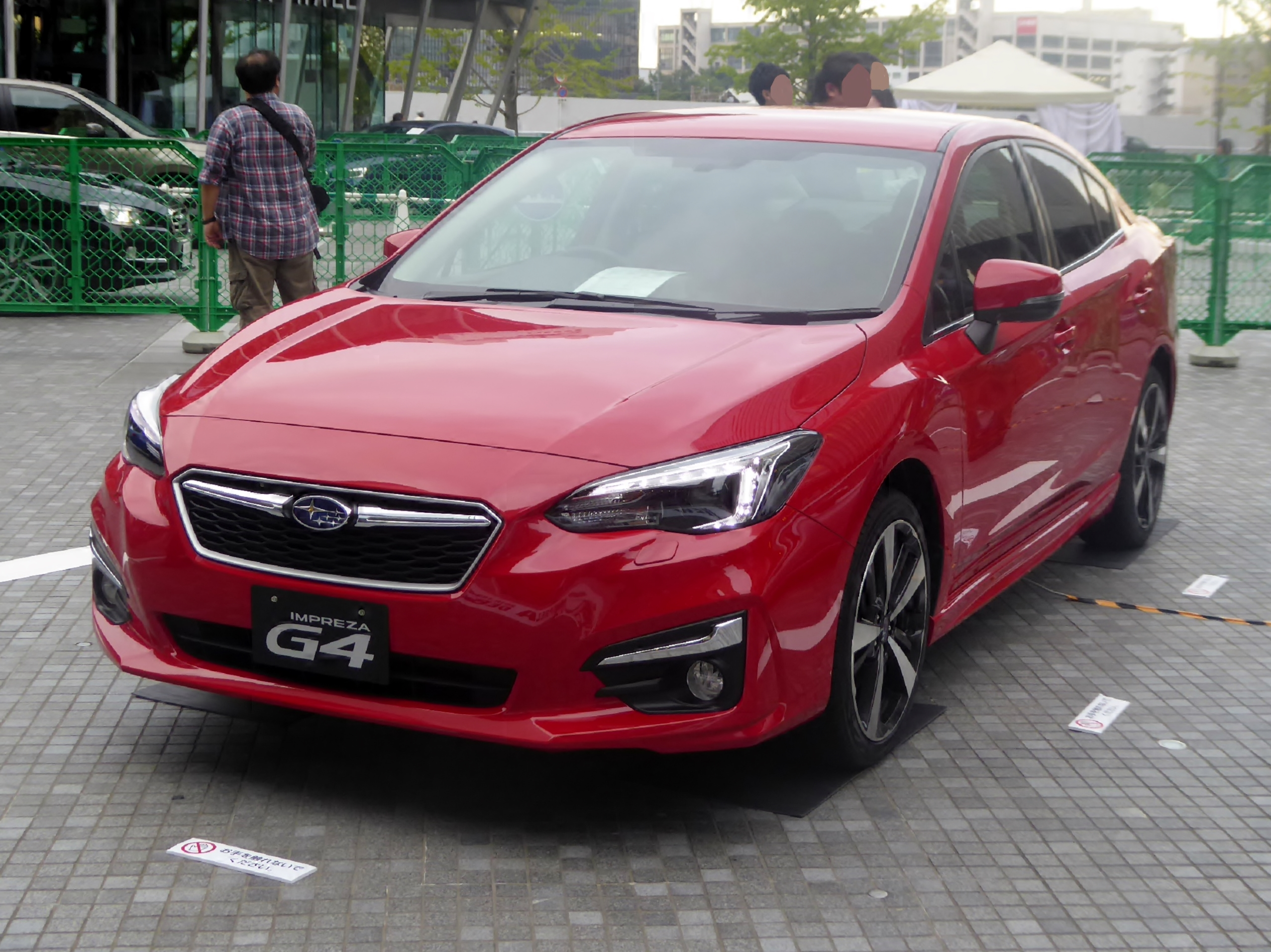 スバル・インプレッサG4 2.0i-S EyeSightの5代目プロトタイプをフロントから撮影。